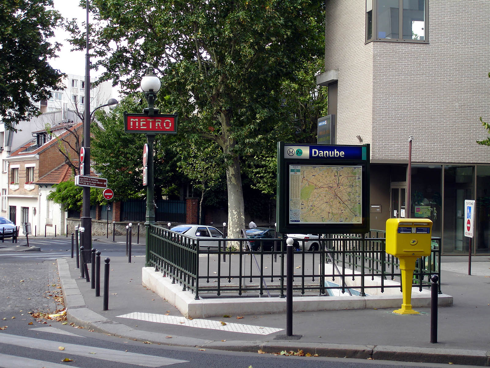 Station Danube de la ligne 7 bis du métro de Paris, France.